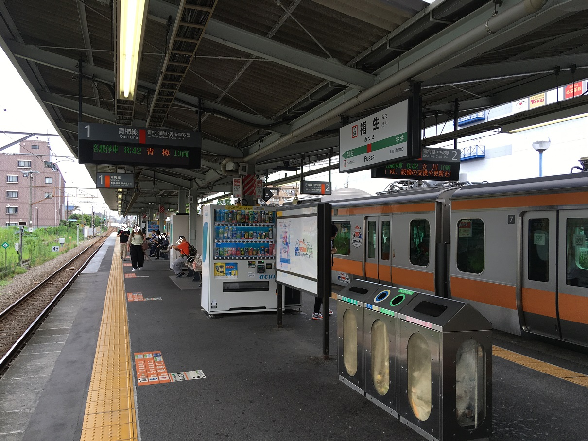 福生駅ホーム